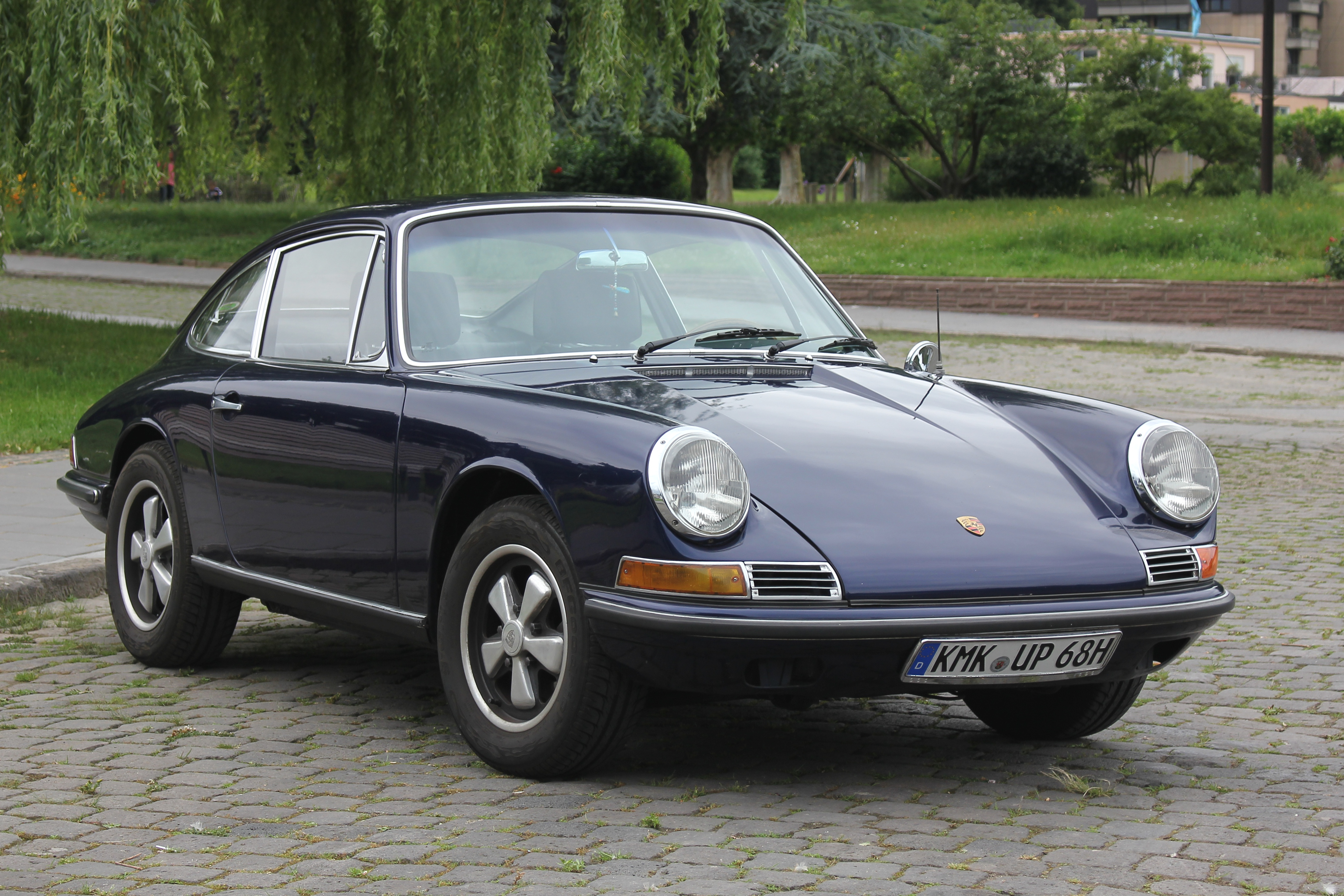 Porsche 912, gleiche Karosserie wie 911, aber mit Vierzylindermotor (fiktives Kennzeichen)